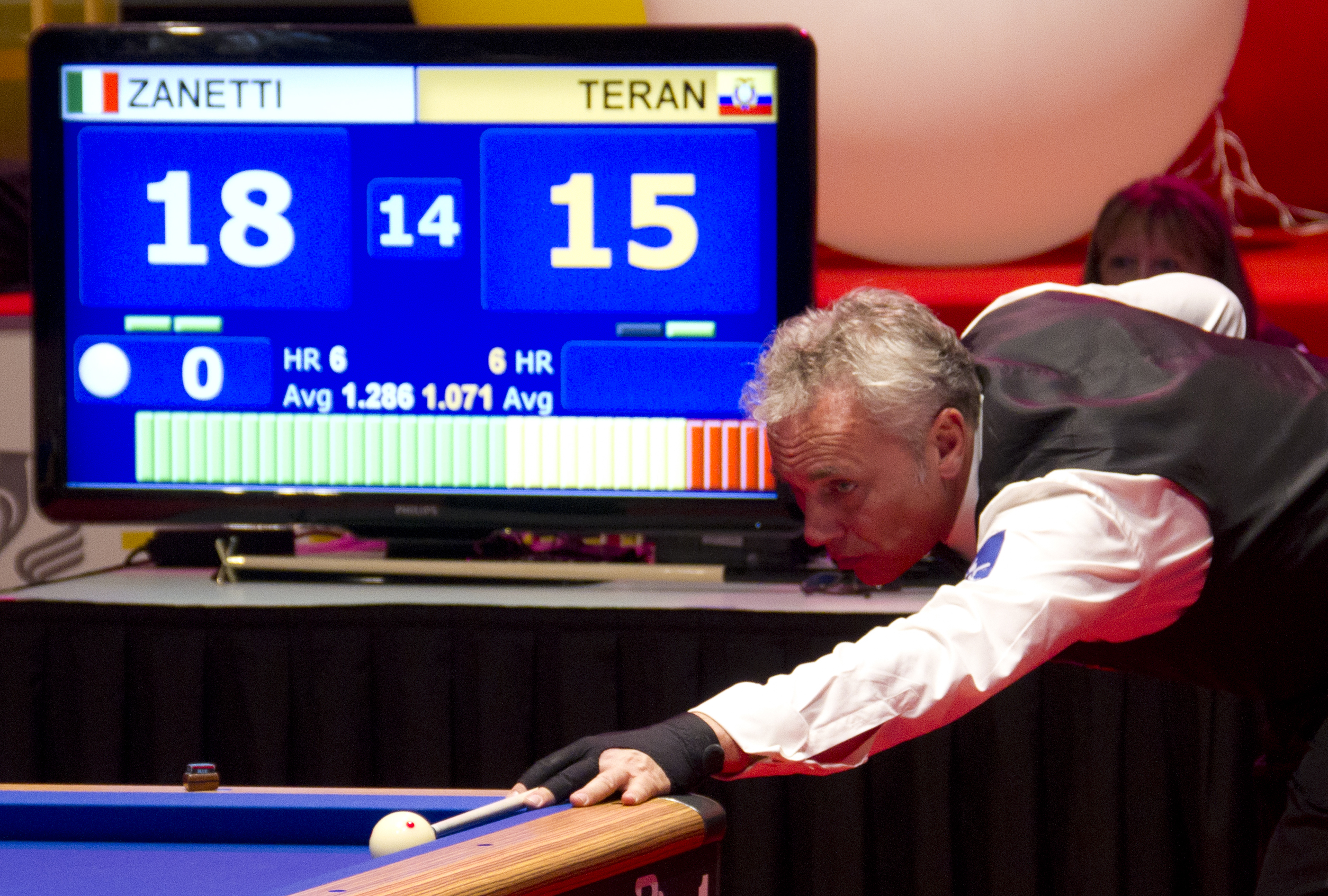 see file name